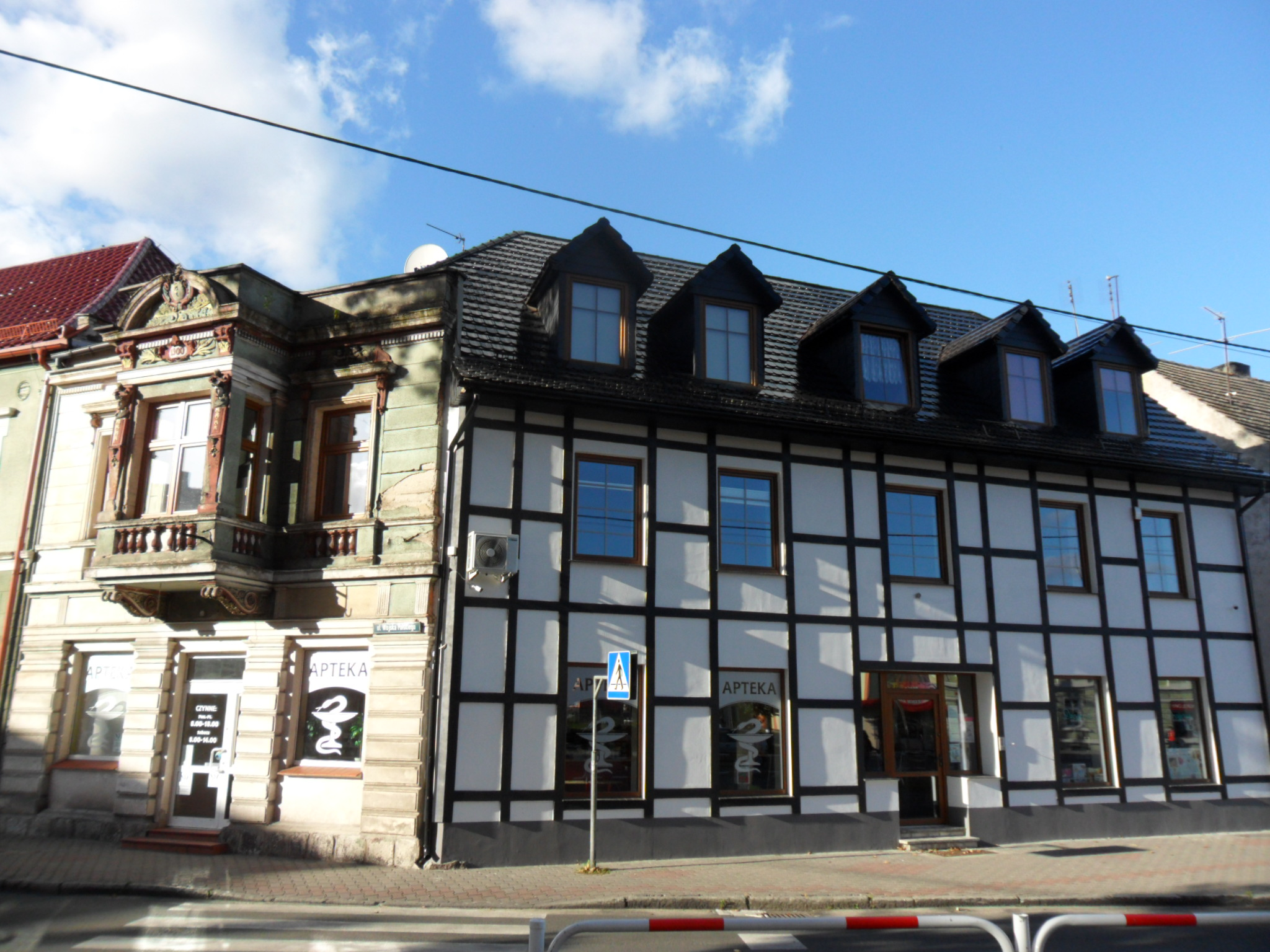 Jastrowie, ul. Konopnickiej 71 - dom, XVIII